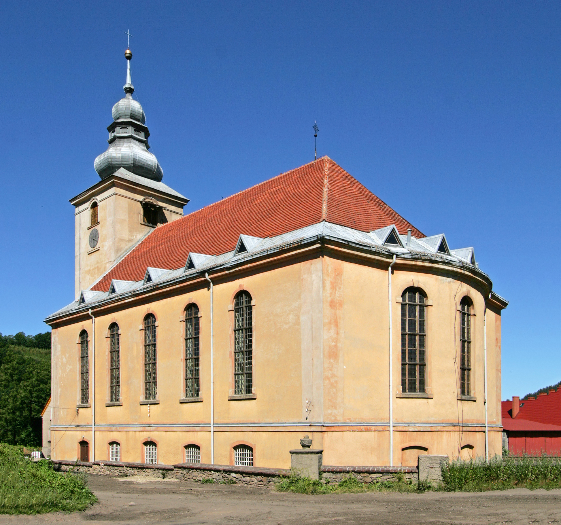 Walim - dawny kościół ewangelicki, ob. rzymskokatolicki kościół parafialny p.w. św. Jadwigi, 1771